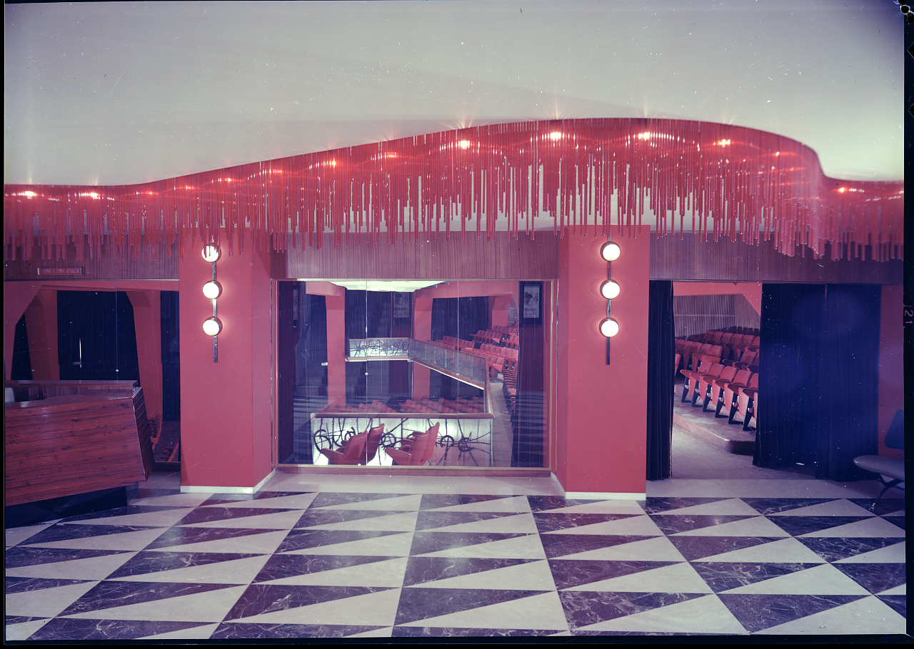 Milano. Architetto Gerli, Cinema Ambasciatori. Platea e Galleria. Vista verso lo schermo. Servizio fotografico : Italia, 1970 / Paolo Monti. - Buste: 5, Fototipi: 5 : Negativo colore, sviluppo cromogeno/ pellicola ; 10x12, 13x18. - ((Serie costituita da 5 buste sciolte di negativi colore identificati con i nn.: 1268, 1269, 1270, 1271, 1272. - Sulla busta identificata con il n. 1268 iscrizione didascalica manoscritta a penna. - I negativi presentano segni di degrado? (alterazione tonale). - La suddetta serie è contenuta nella scatola GC1175-1272N, formato 18x24, e identificata cin l'iscrizione didascalica manoscritta a pennarello nero: "Colore/ N.". - Fonte: Rubrica di Paolo Monti: Archivio 10x12 (ultimi numerati) - dal G1 al (s.d.), presso Archivio Paolo Monti